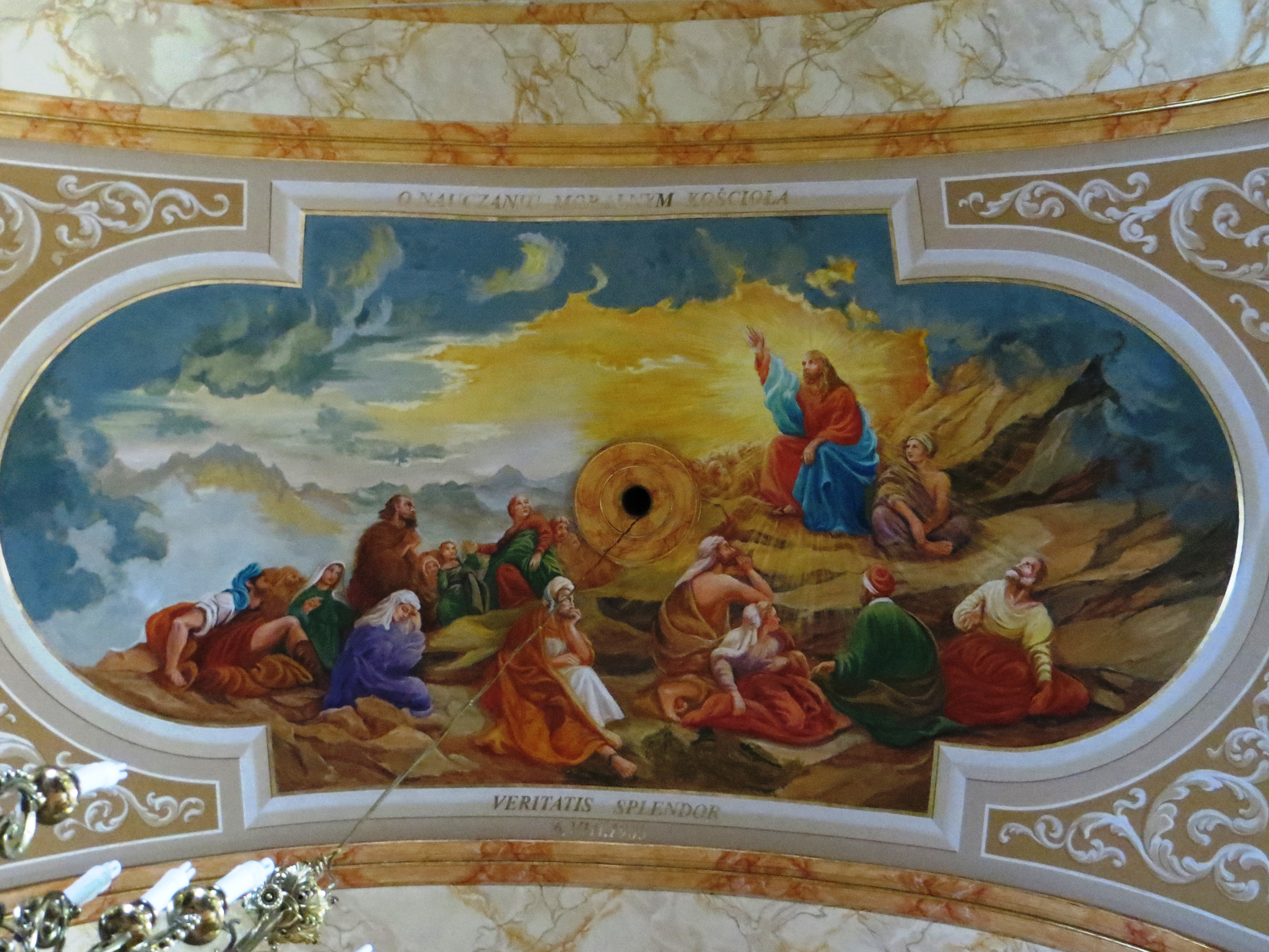 Malowidła na suficie w bazylice ONMP w Wadowicach.